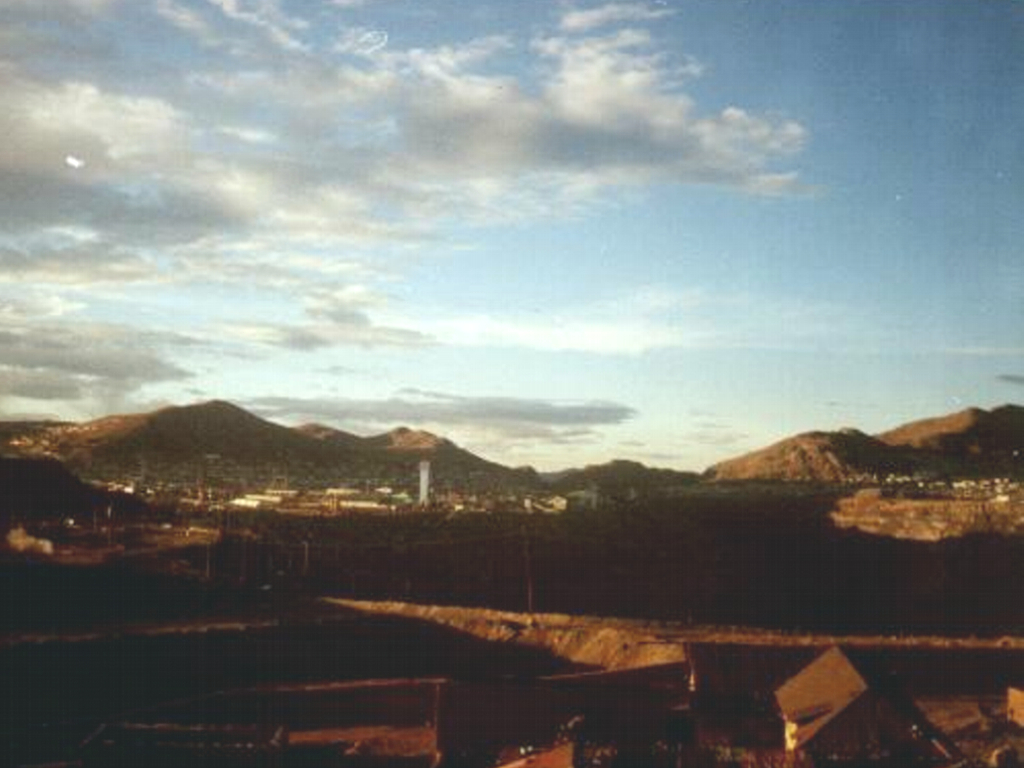 Fotografia tomada por nosotros mismos.